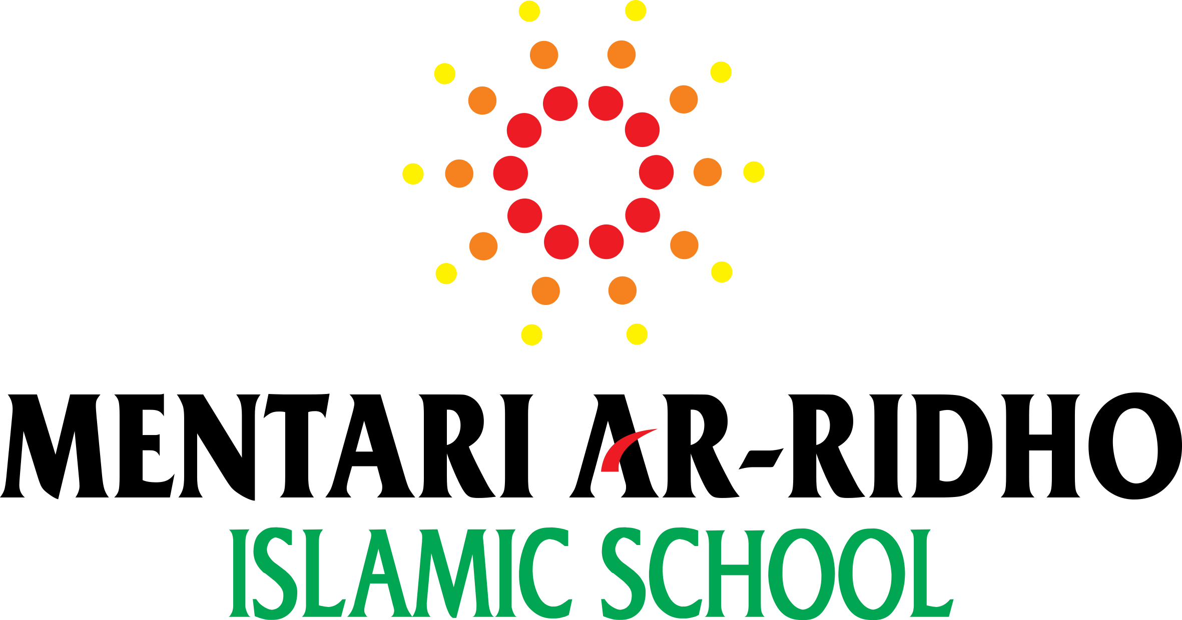 Logo Mentari Ar-Ridho Islamic School